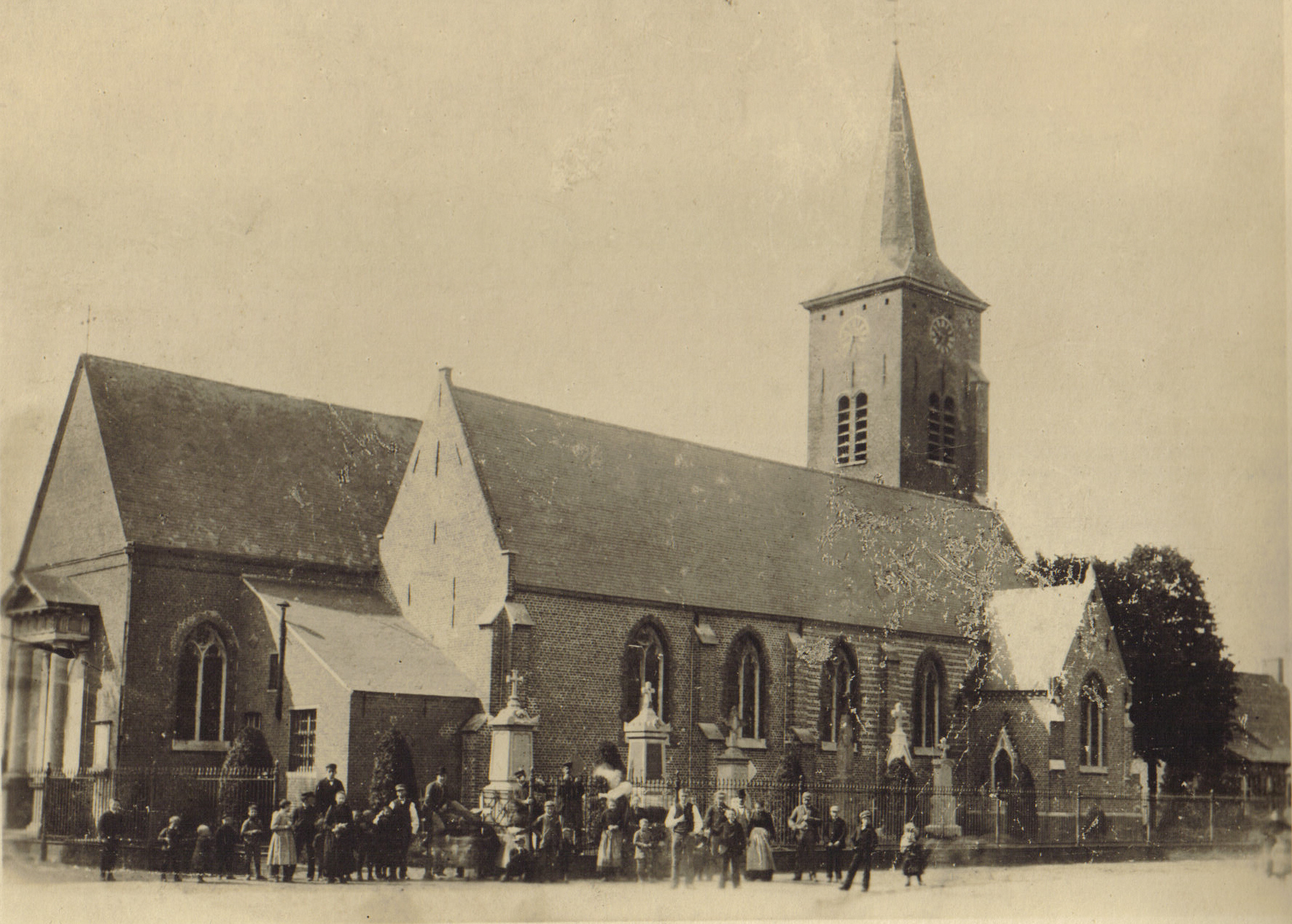 Oude foto van de kerk zonder uitbouw achteraan